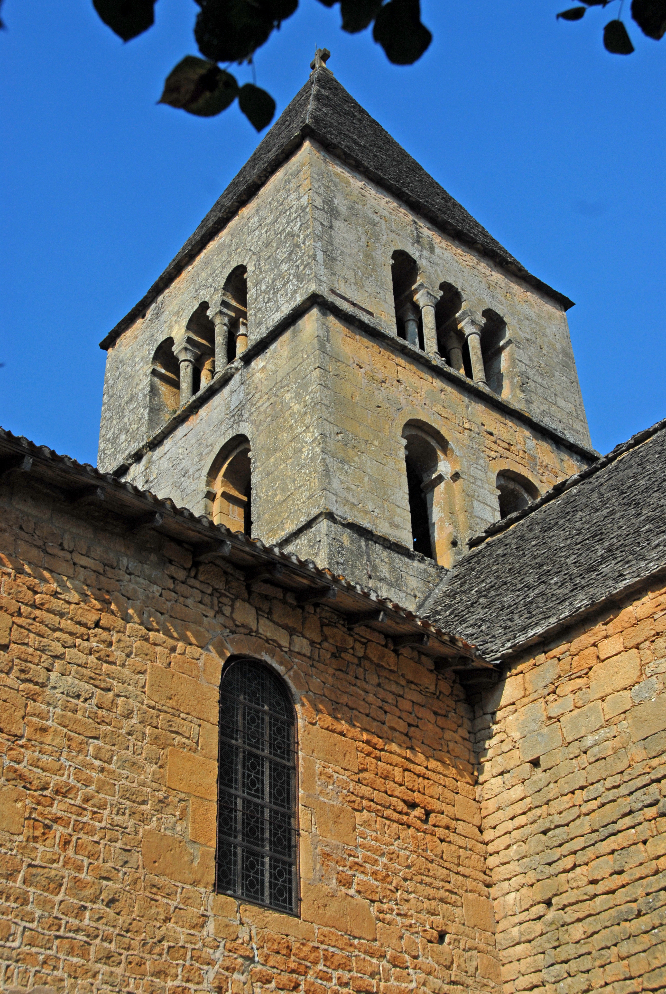 Saint-Léon-sur-Vésère, Turm, von S-W